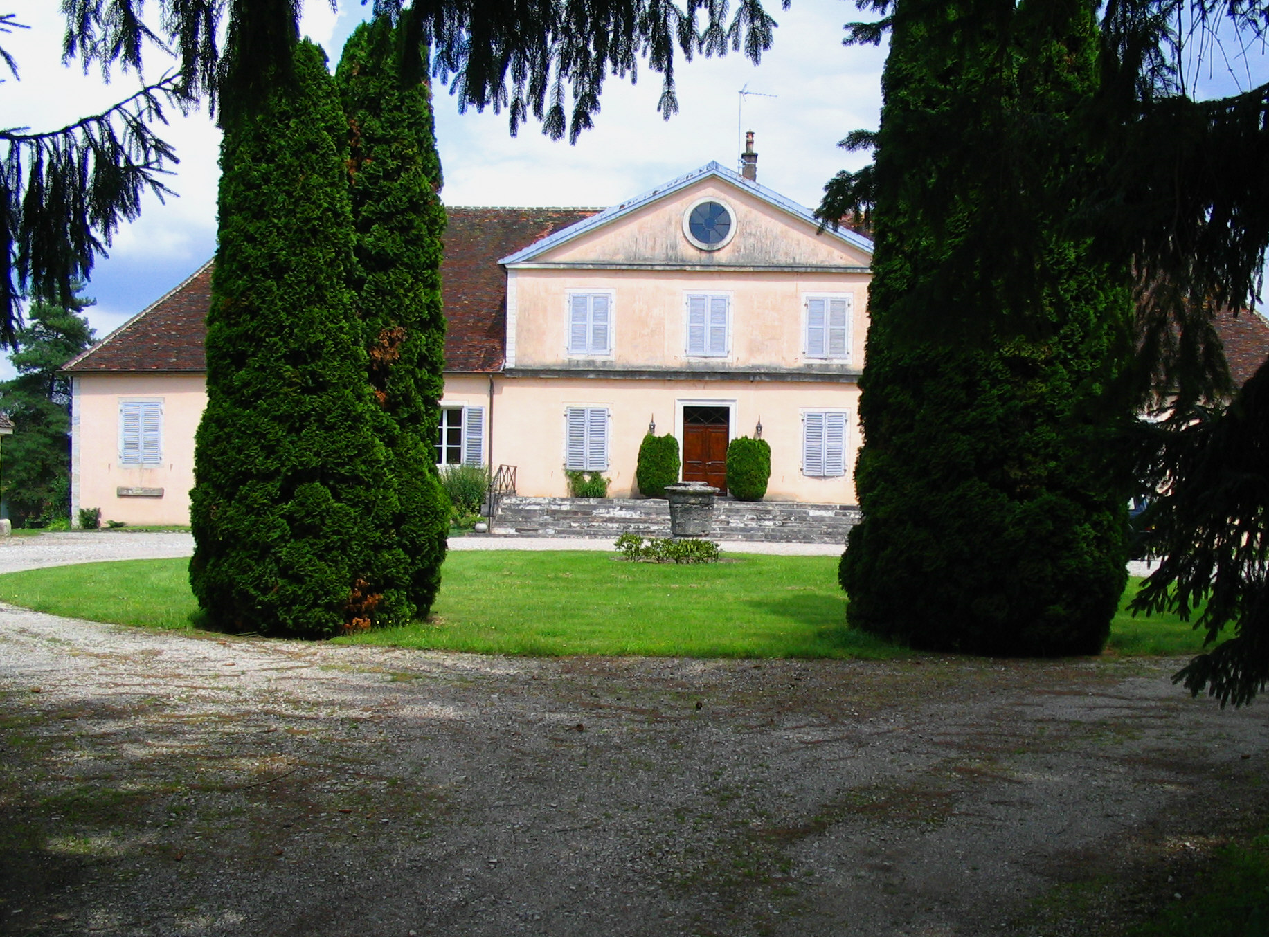 Vue des Forges de Pesmes, château du Maître de Forges - Pesmes - Haute-Sâone - France